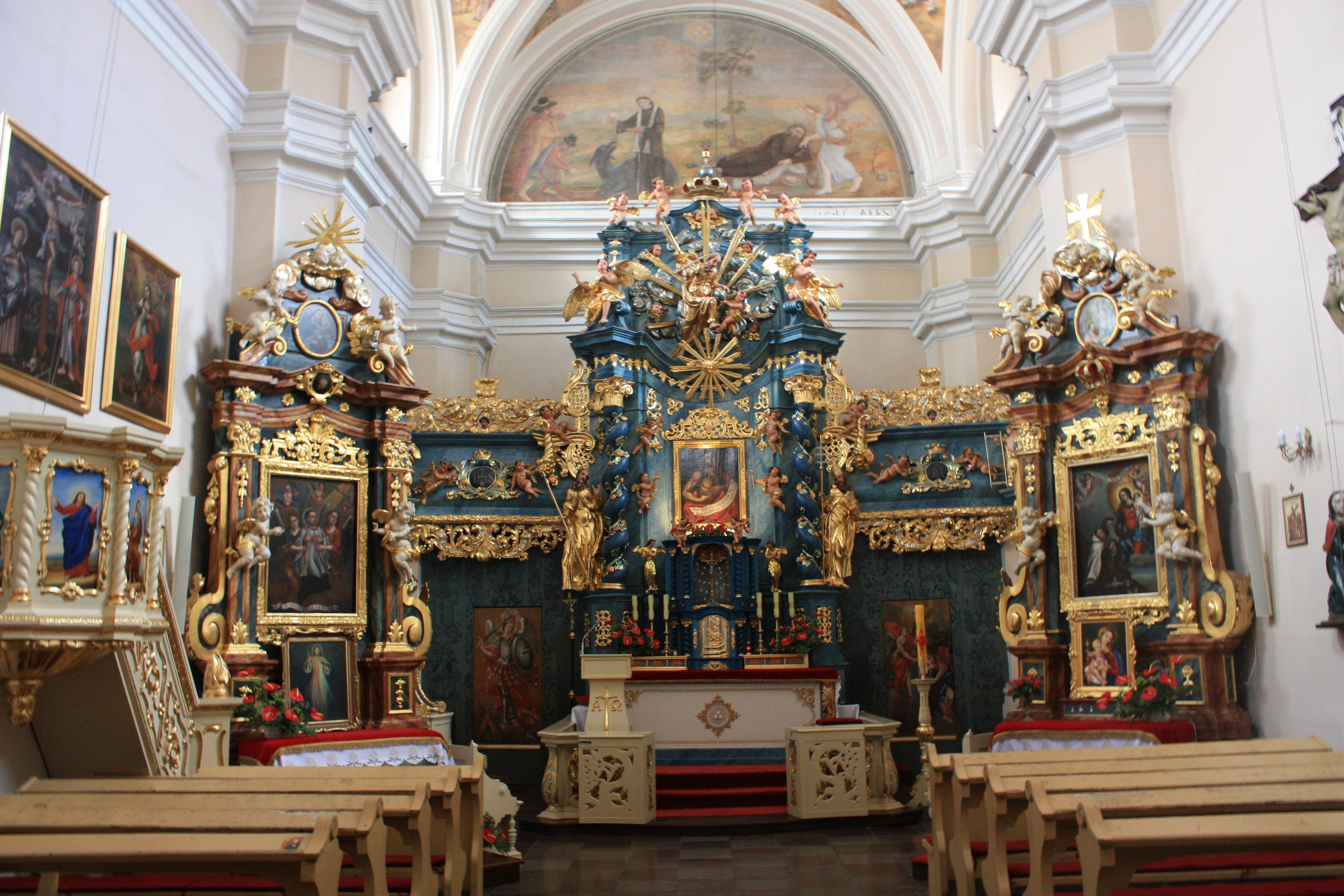 Kościół Najświętszej Krwi Pana Jezusa w Poznaniu. Widok spod chóru muzycznego.